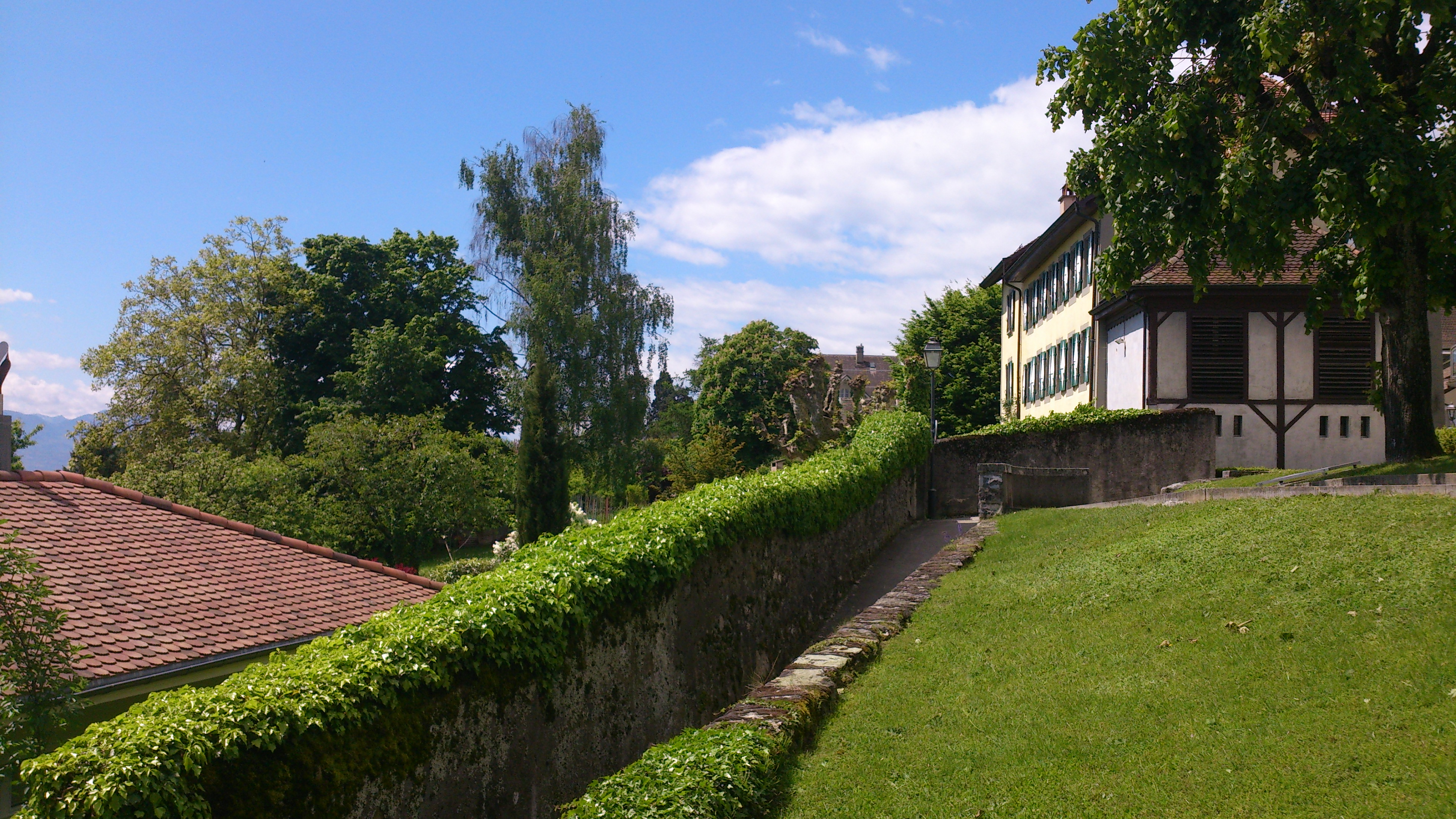 Ecublens